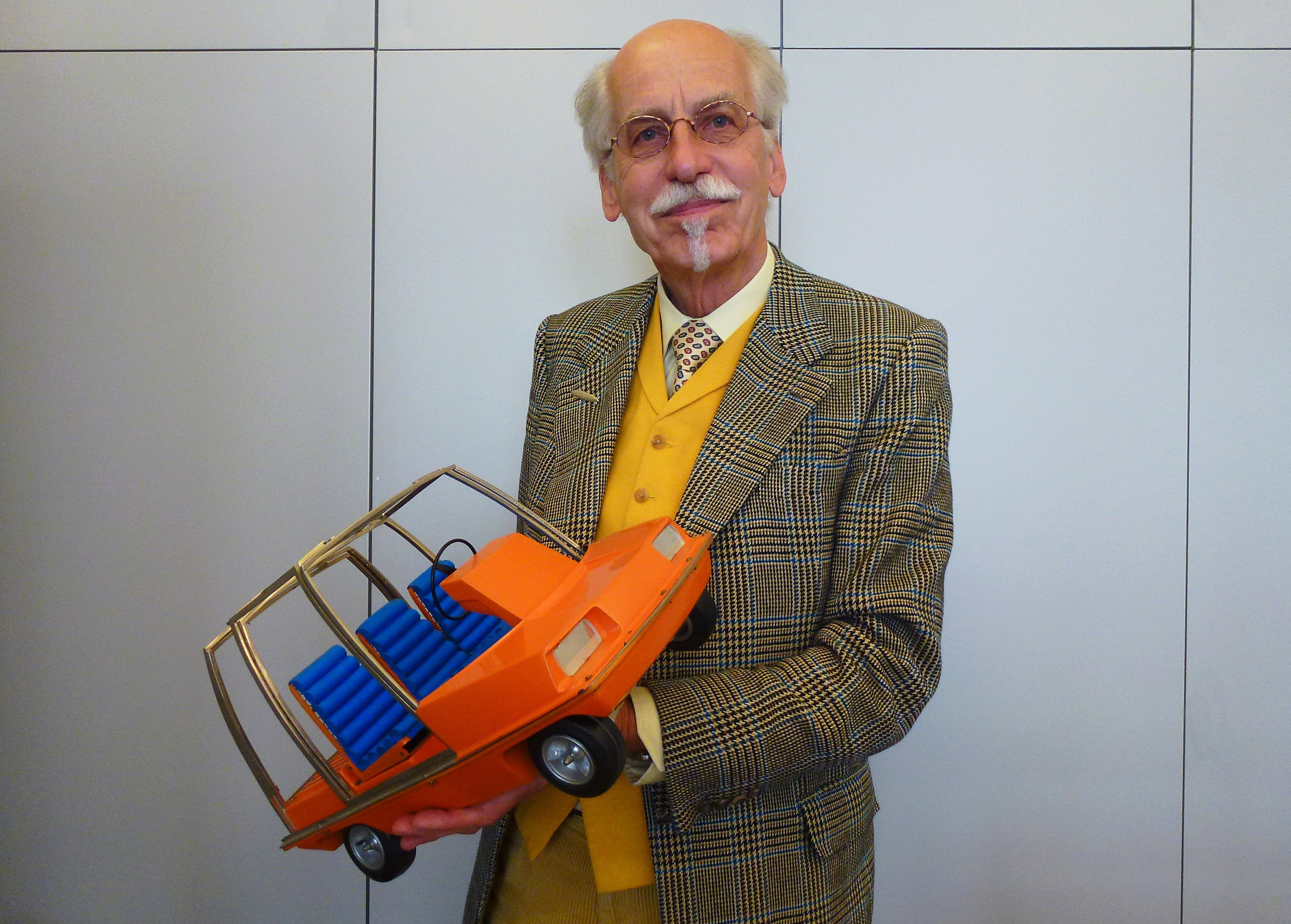 Hans Ehrich med sitt examensarbete från 1967, elbilen "Optima"